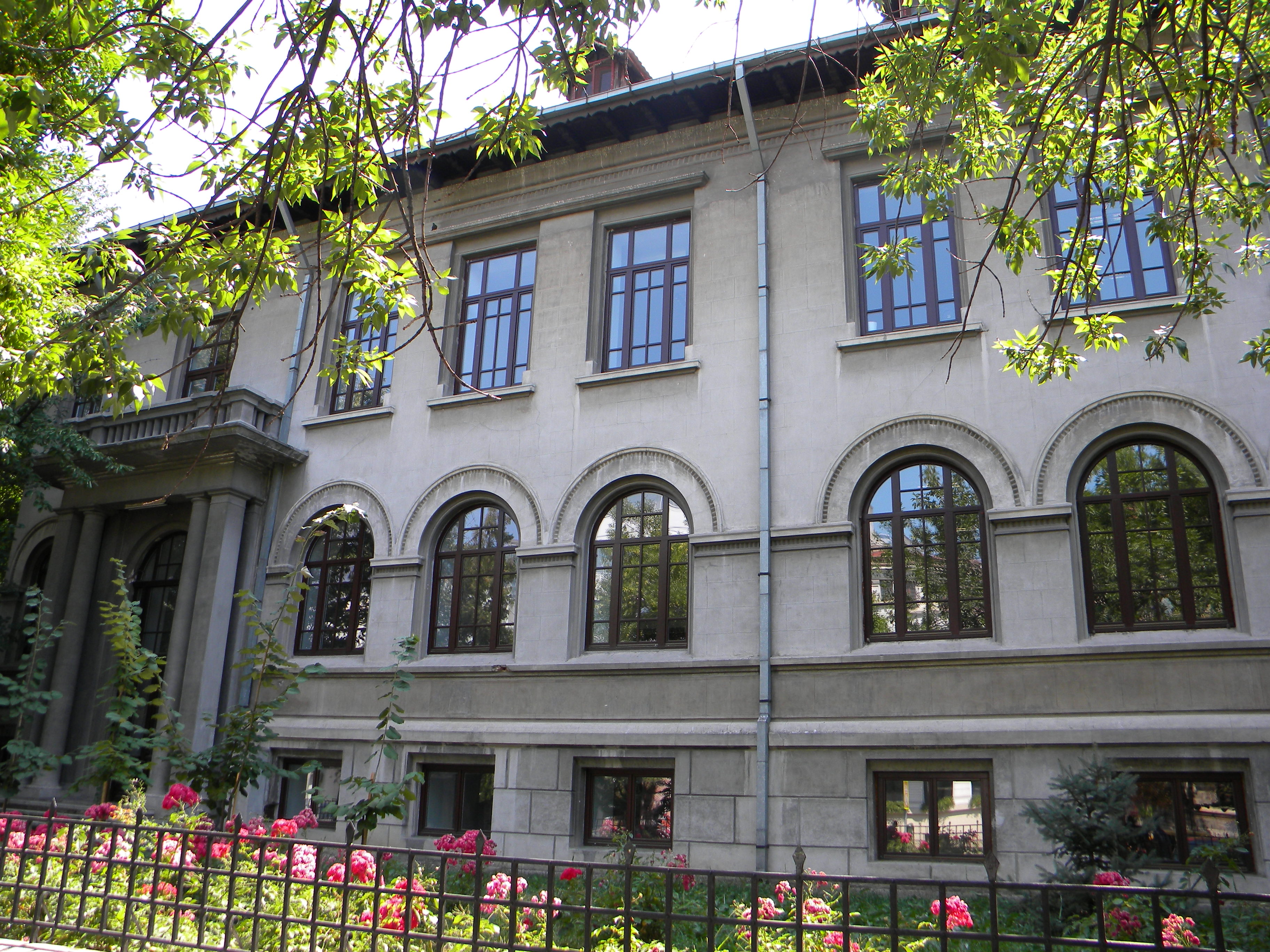 Conservatorul Ciprian Porumbescu, Str. Stirbei Voda nr. 33, Bucuresti sect. 1.JPG (detaliu 1)